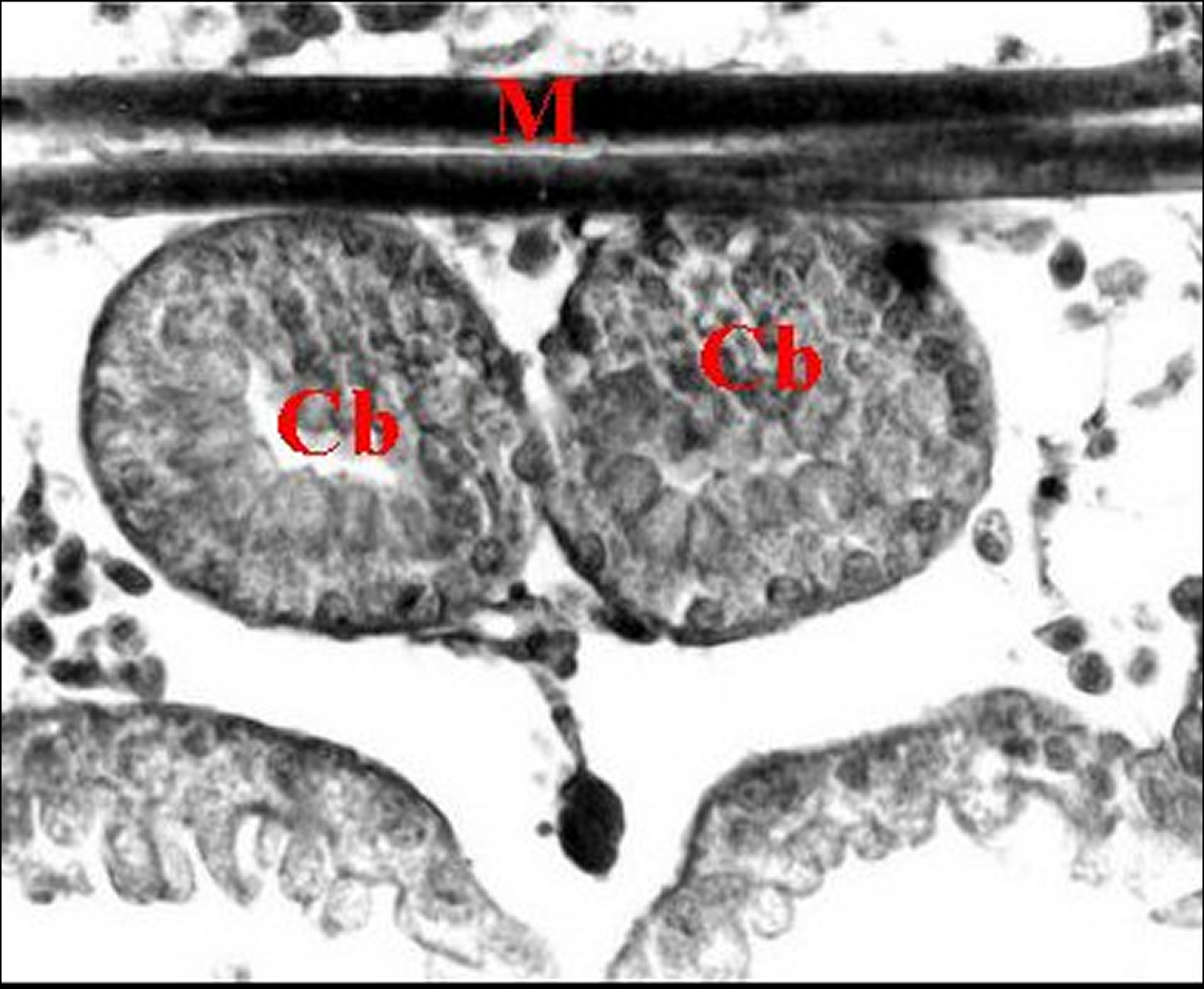 Glande rostrale de Diguetia canities, coupe histologique transversale